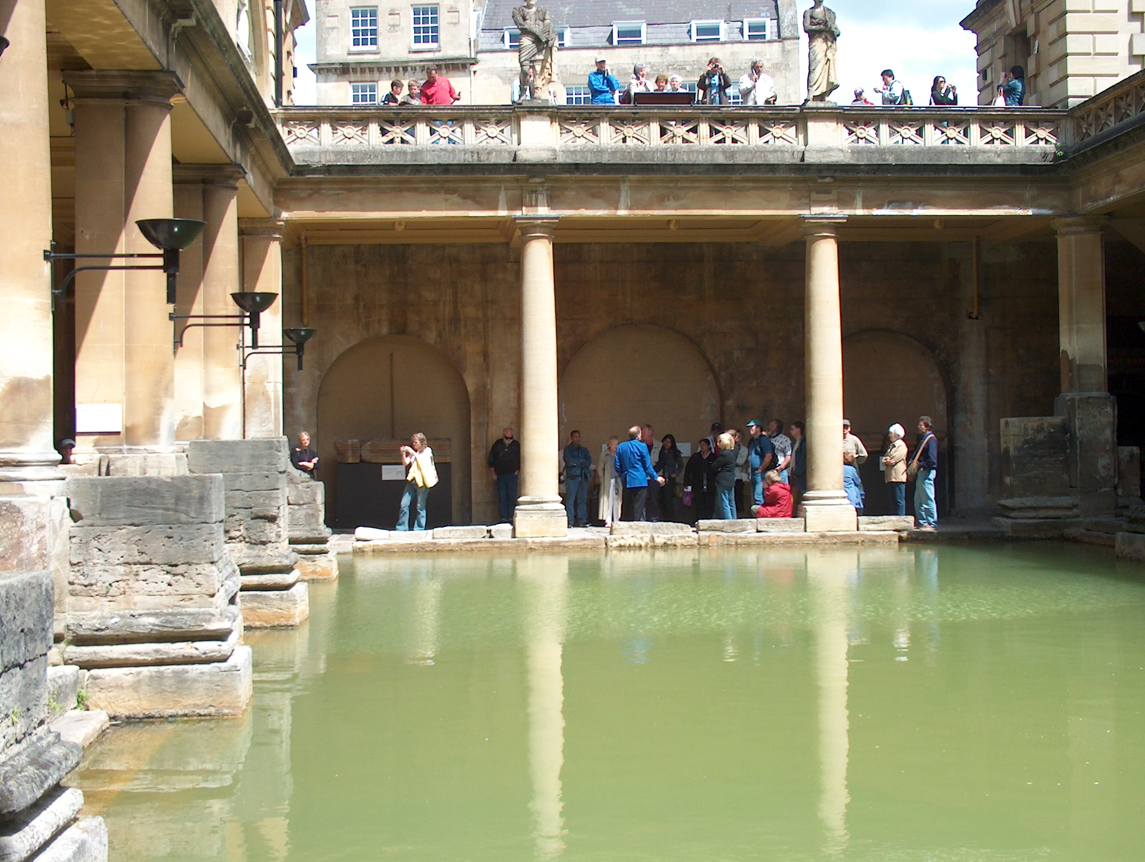 Das römisches Bad in der Stadt Bath,in Südengland.